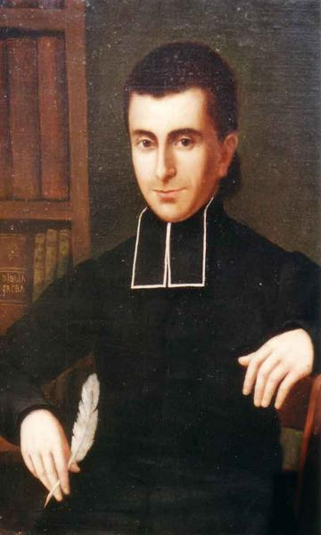 Peinture de famille de Louis-Edouard Cestac jeune